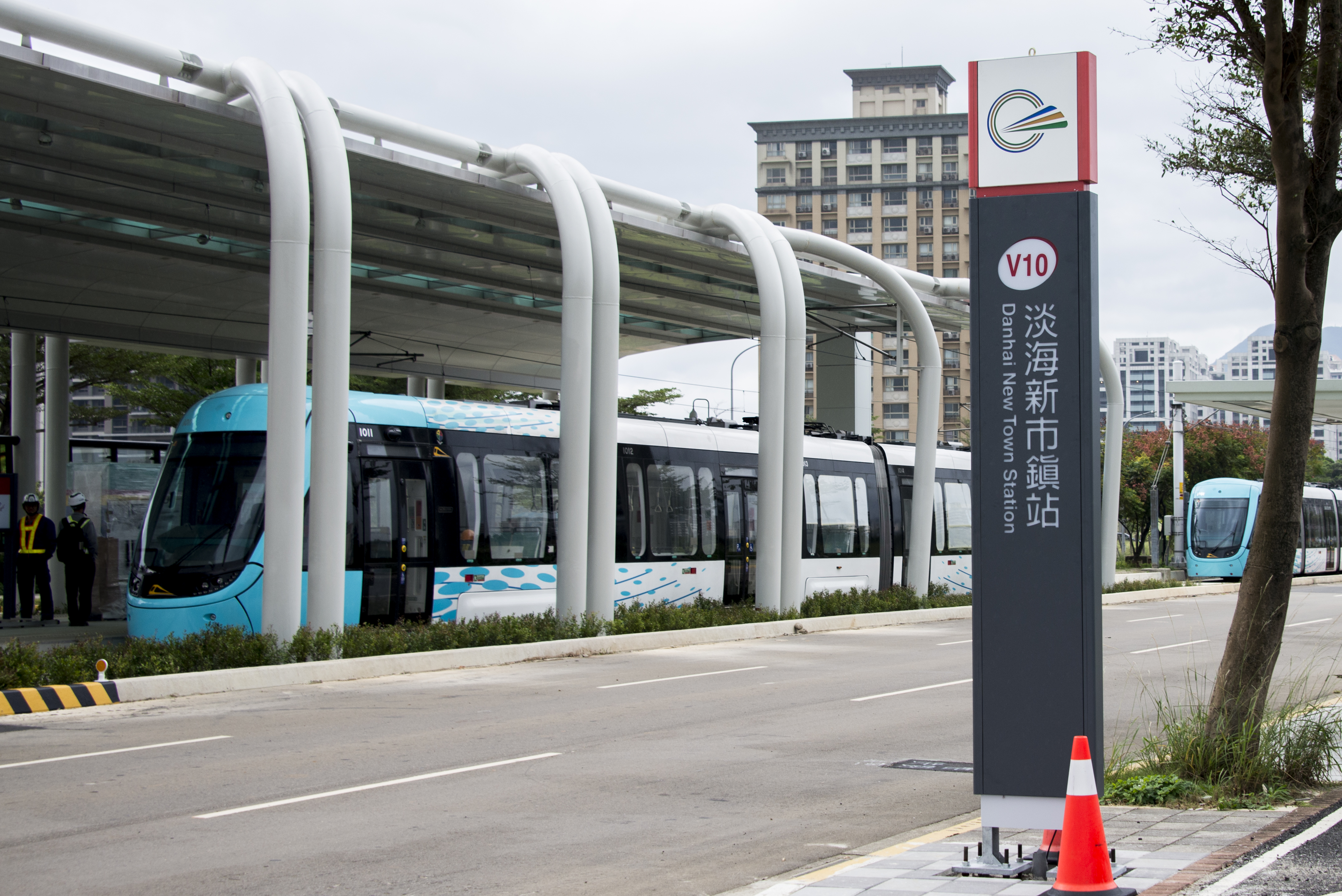 中文（台灣）: 淡海輕軌淡海新市鎮站